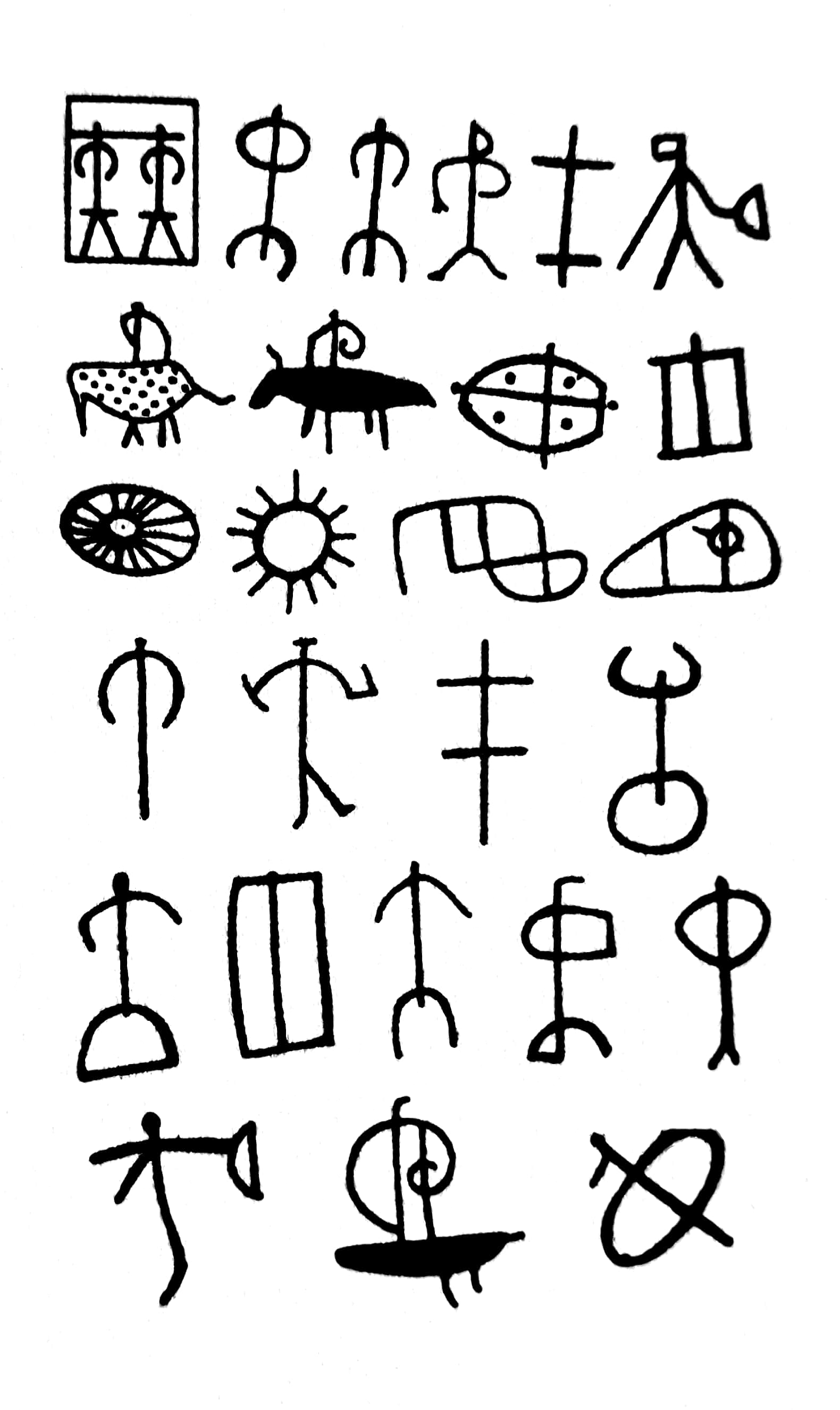 සිංහල: cave paintings ශ්‍රී ලංකාවේ ඓතිහාසික ගුහා සිතුවමි කිපයක්